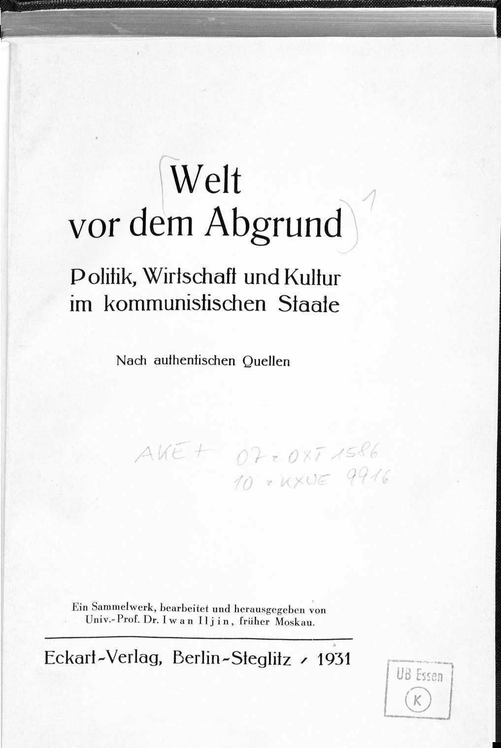 Iwan IIljin (Hrsg.): Welt vor dem Abgrund. Politik, Wirtschaft und Kultur im kommunistischen Staate. Eckart-Verlag, Berlin-Steglitz 1931